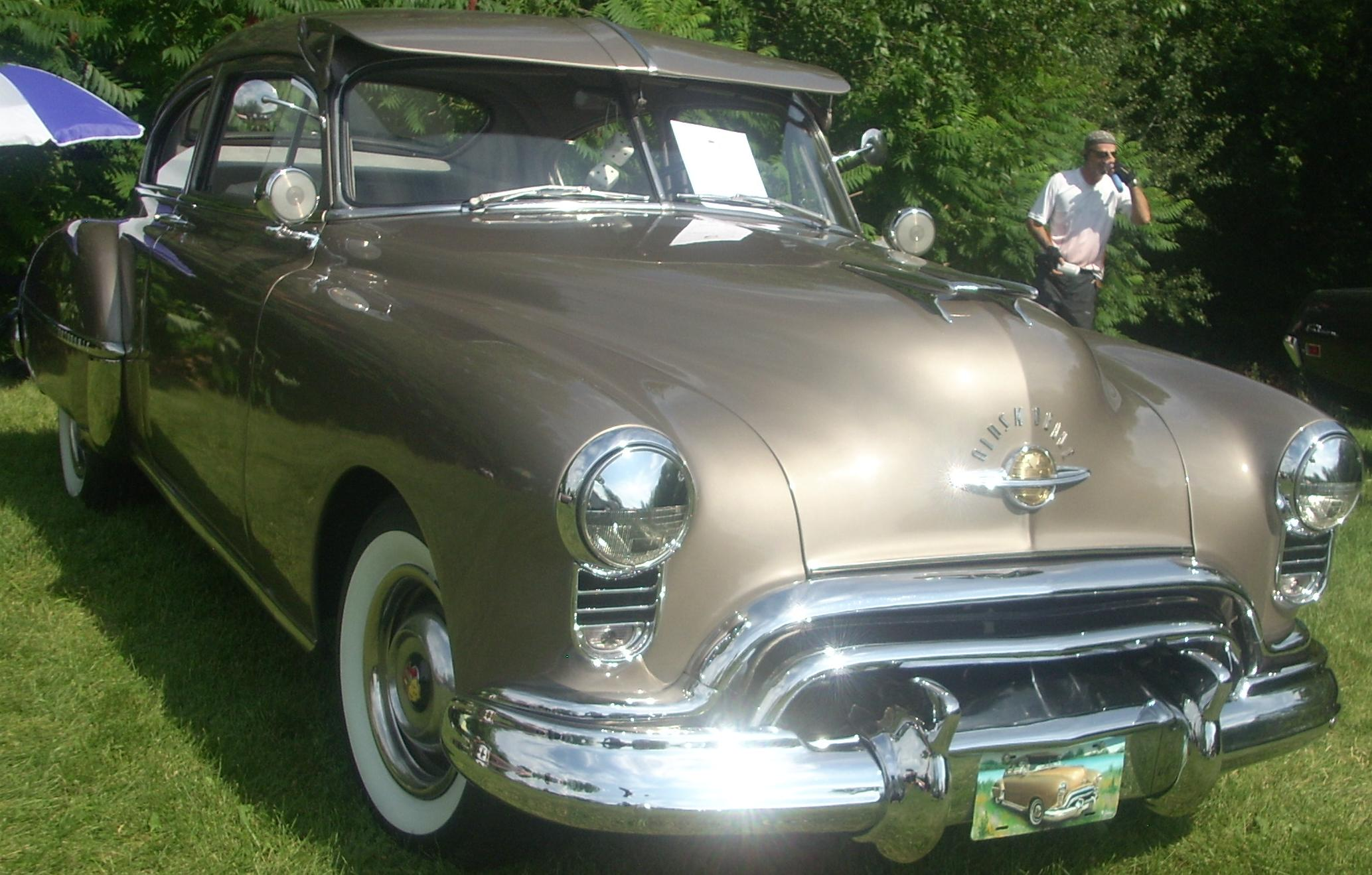 1949 Oldsmobile Futuramic 98 photographed in Laval, Quebec, Canada at Auto classique Laval 2010.